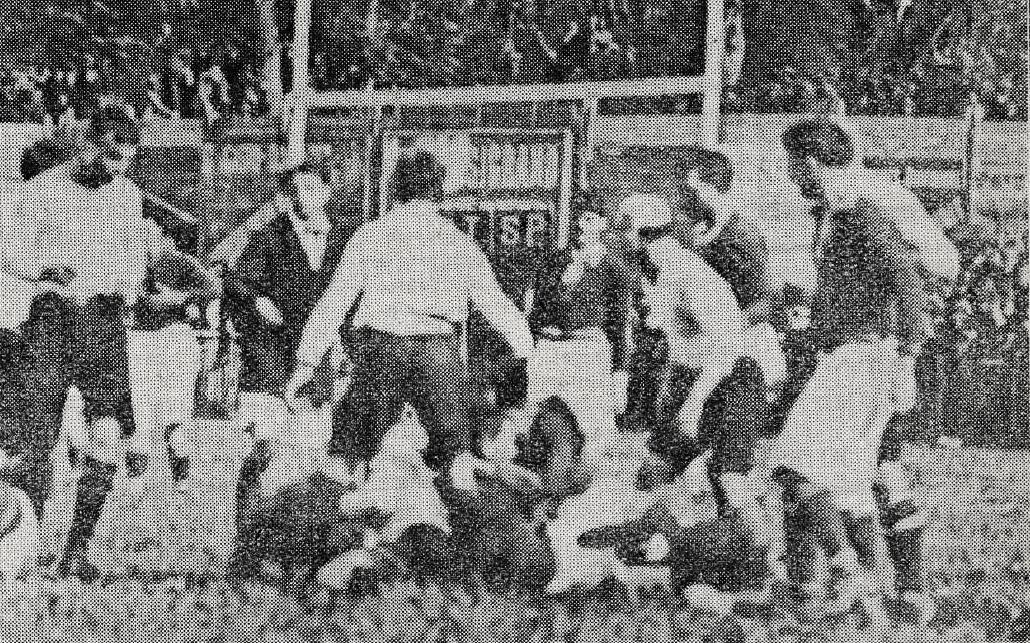 Finale du Championnat de France de rugby 1913-1914, AS Perpignanaise-Stadoceste Tarbais.